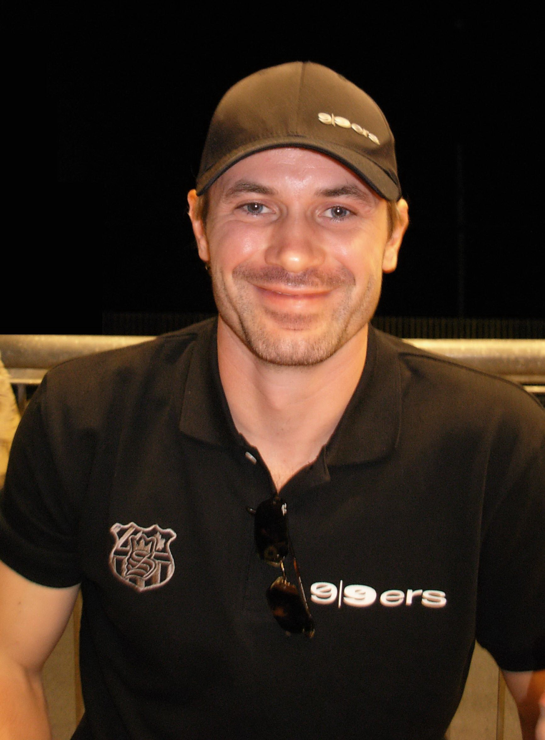 Eishockeyspieler Ivo Jan